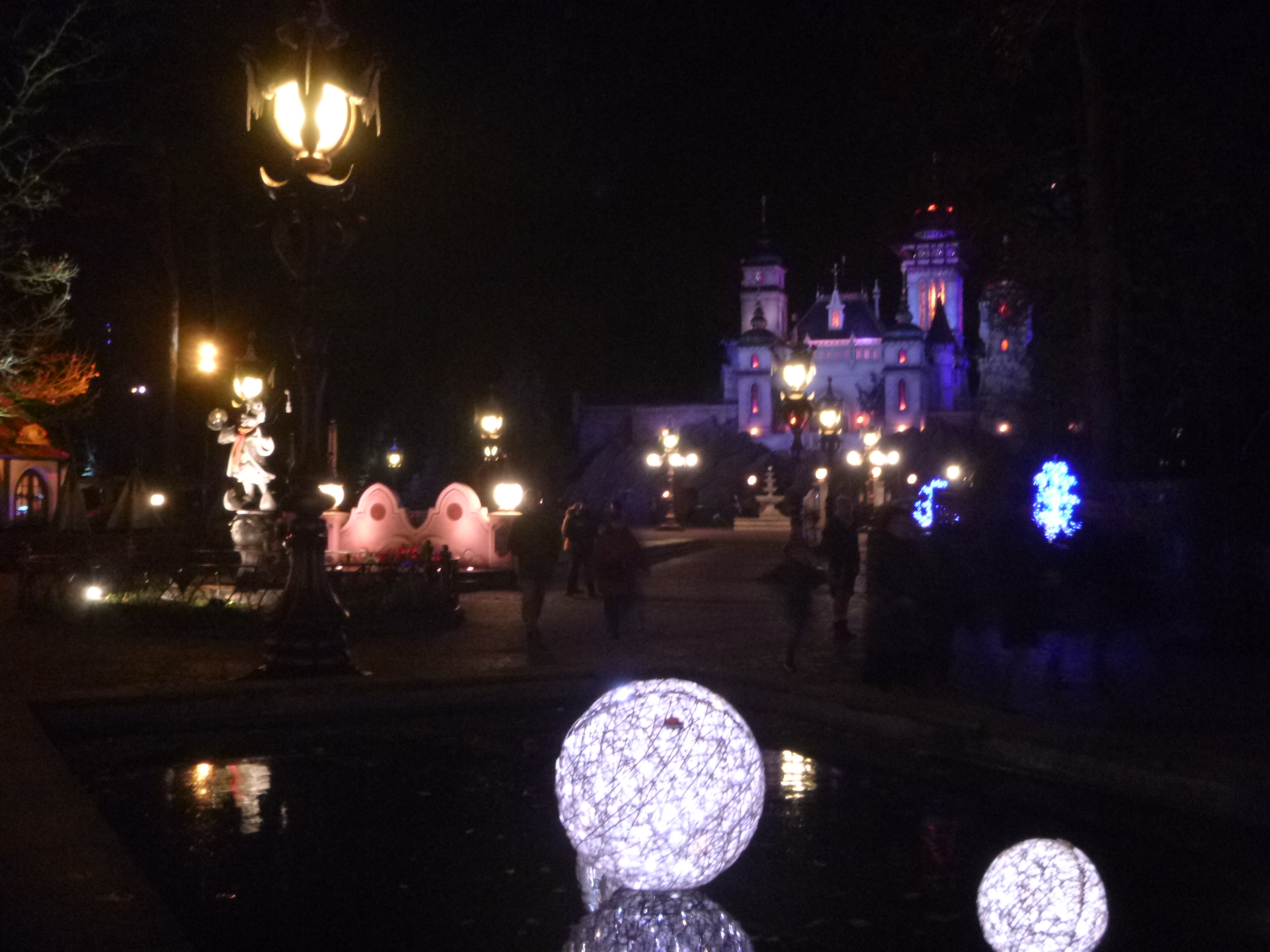 La Pardoes Promenade de nuit